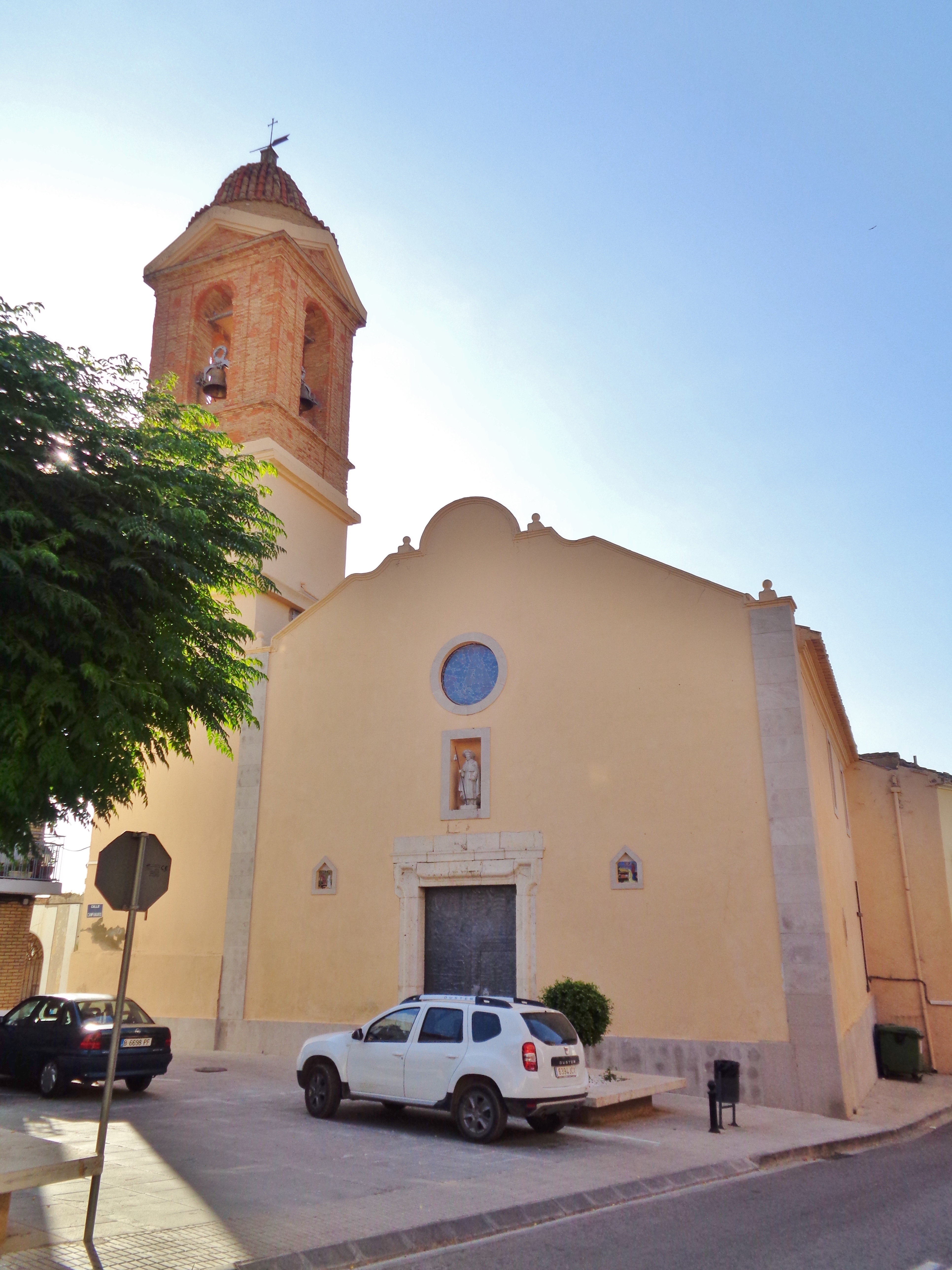 Alboraig.